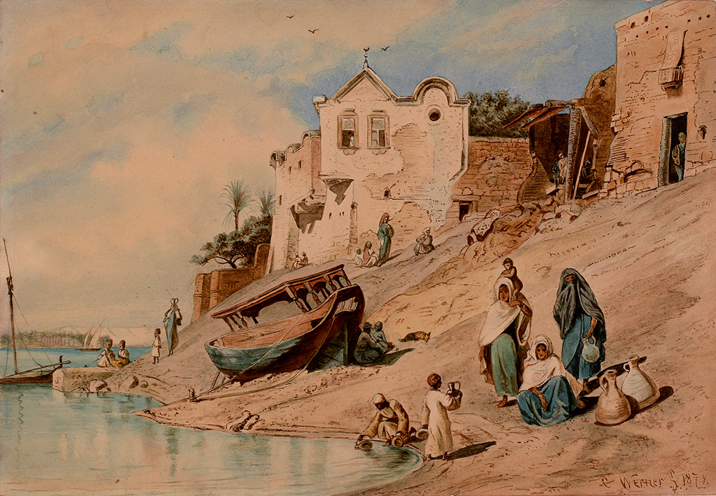 Frauen mit Kindern beim Wasser holen am Nil. Ortsbezeichnet Beni Suef. Aquarell auf festem Papier. 24 x 34,5 cm